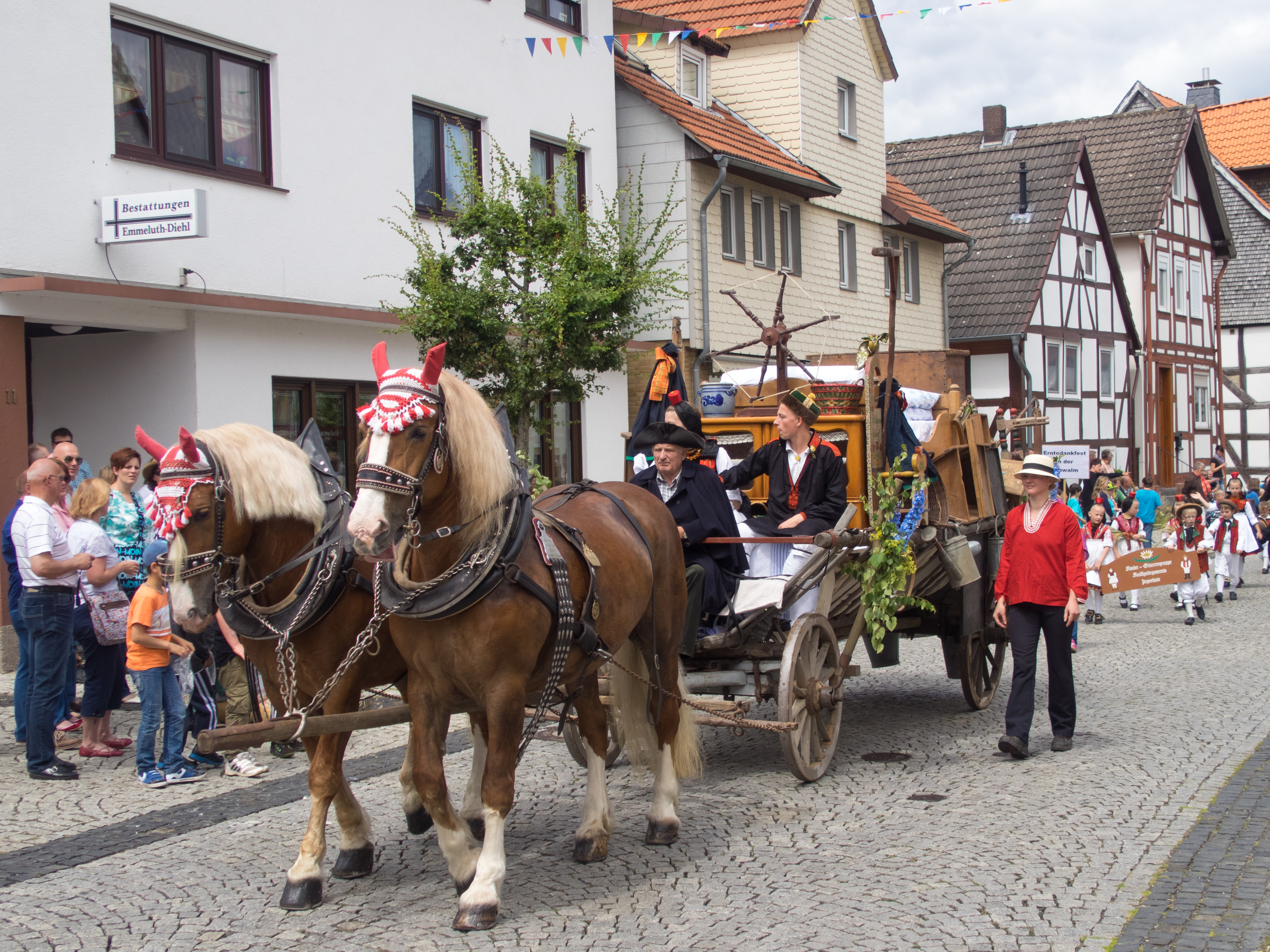 Festzug der Ziegenhainer Salatkirmes von 2014.